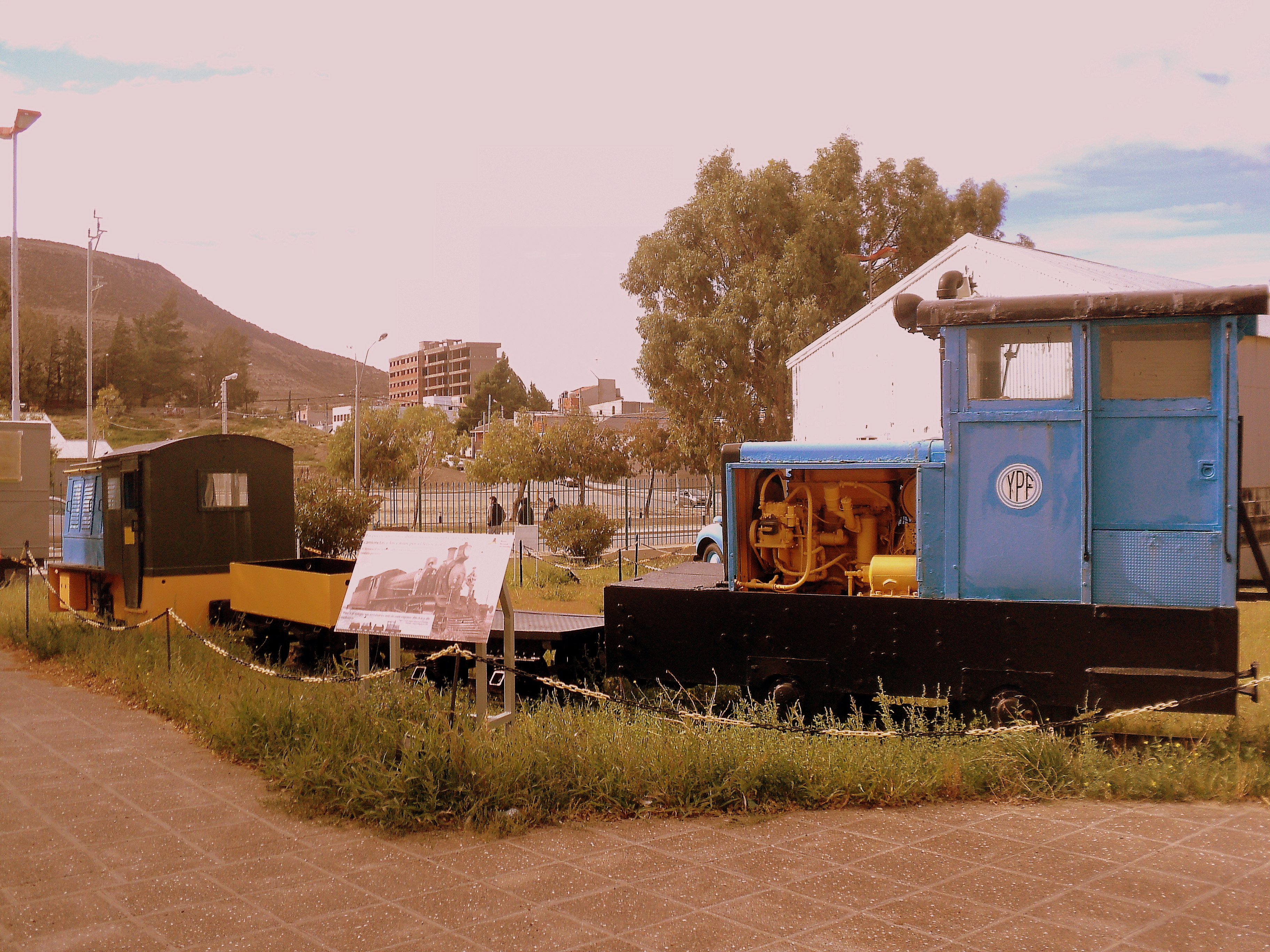 Antiguo tren carguero que utilizó YPF en su explotación. También llevó pasajeros